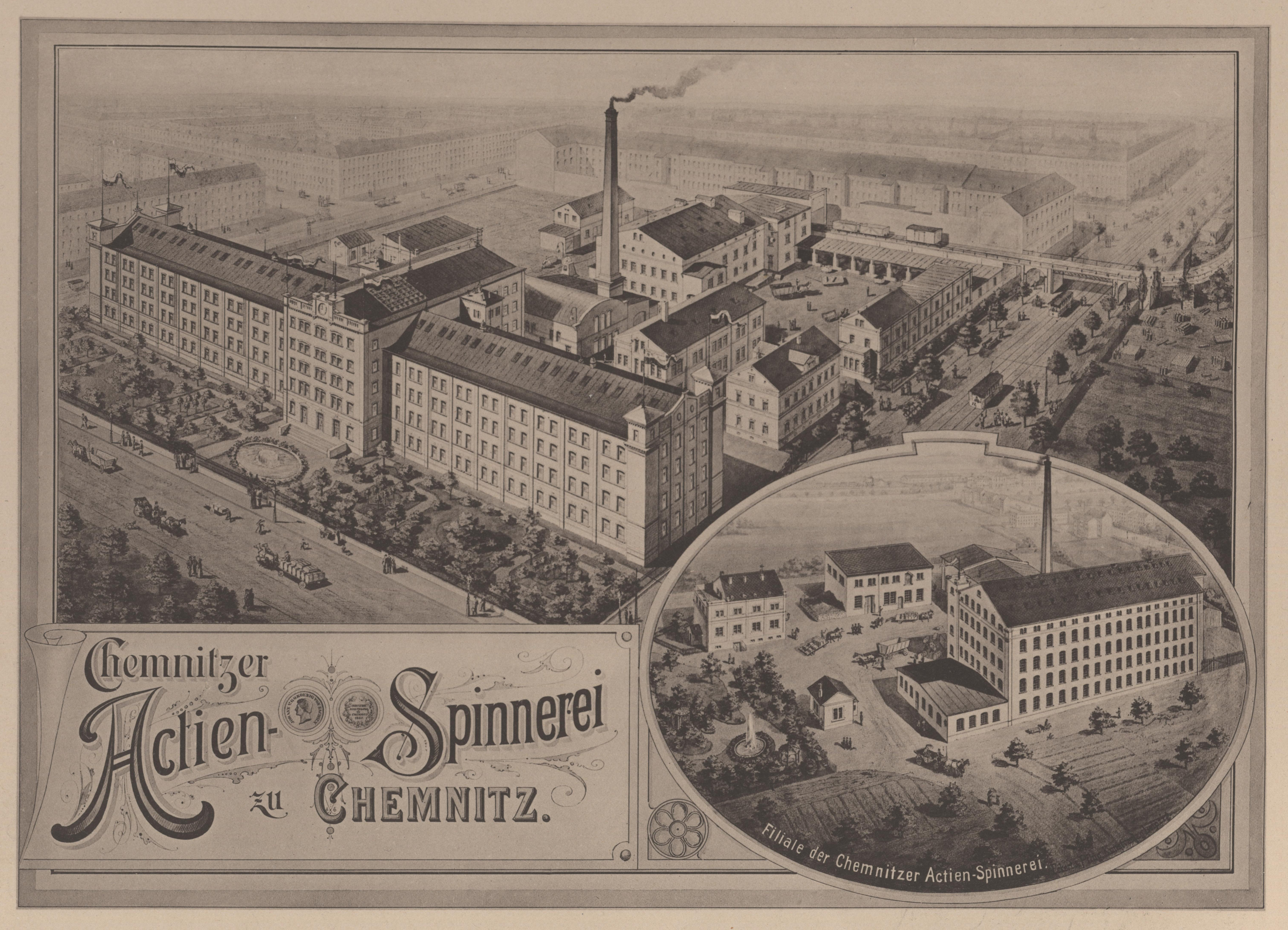 Chemnitzer AktienspinnereiChemnitz aus: Die Groß-Industrie des Königreichs Sachsen in Wort und Bild Zweiter Teil